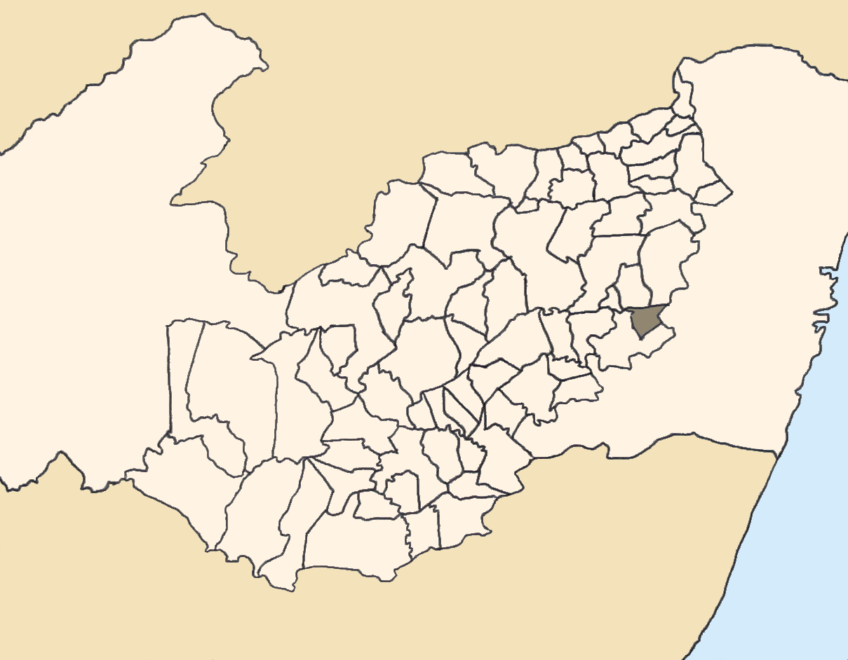 Mapa da mesorregião Agreste de Pernambuco (Brasil) subdivida em municípios. Em destaque, o município de Barra de Guabiraba. Map of the brazilian state of Pernambuco (mesorregião Agreste) showing the city of Barra de Guabiraba. Imagem tratada com o GIMP. Image made with GIMP.